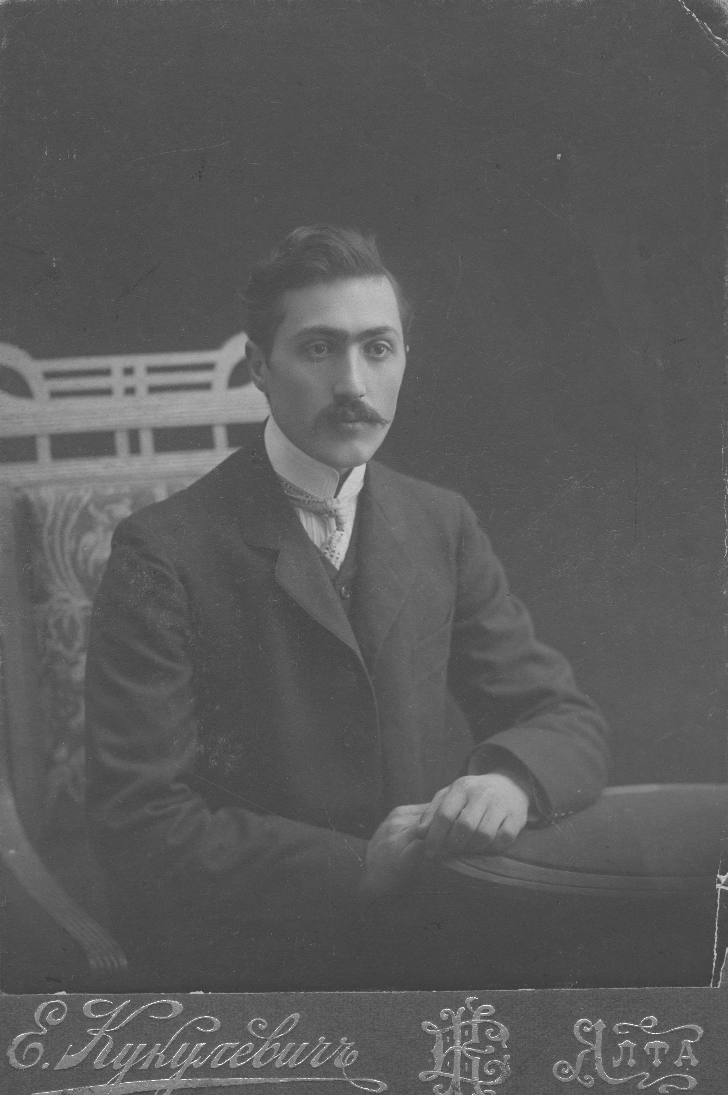 ვალერიან კანდელაკი